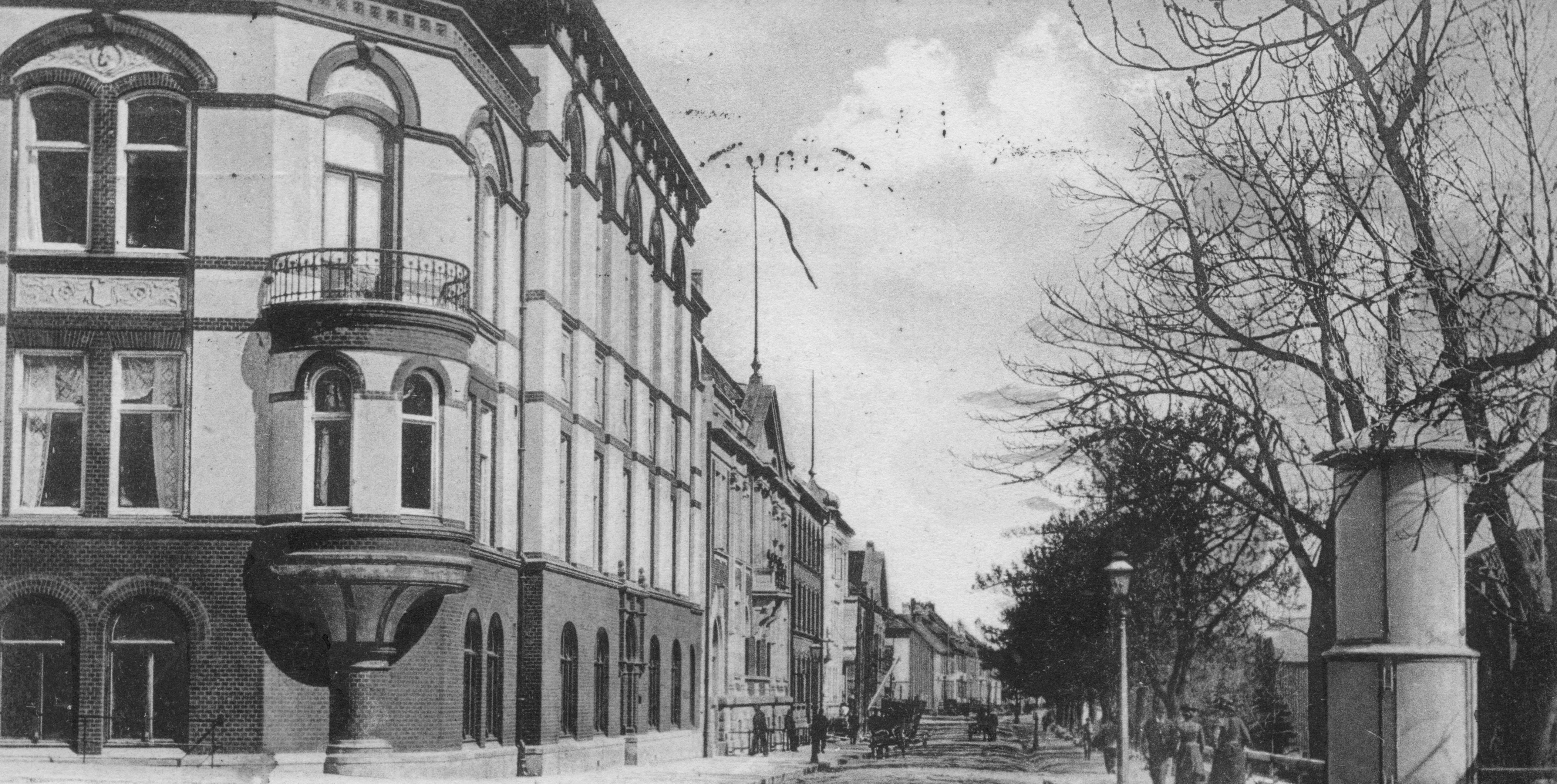 Kjøpmannsgata i Trondheim, sett nordover, fra krysset med Erling Skakkes gate. Fotografert/poststemplet 1908. Nærmeste bygning: Kjøpmannsgata 12, Håndverkerforeningens gård. Trondheim folkebibliotek holdt til her fra 1902 til de flyttet inn i byens gamle rådhus i 1933